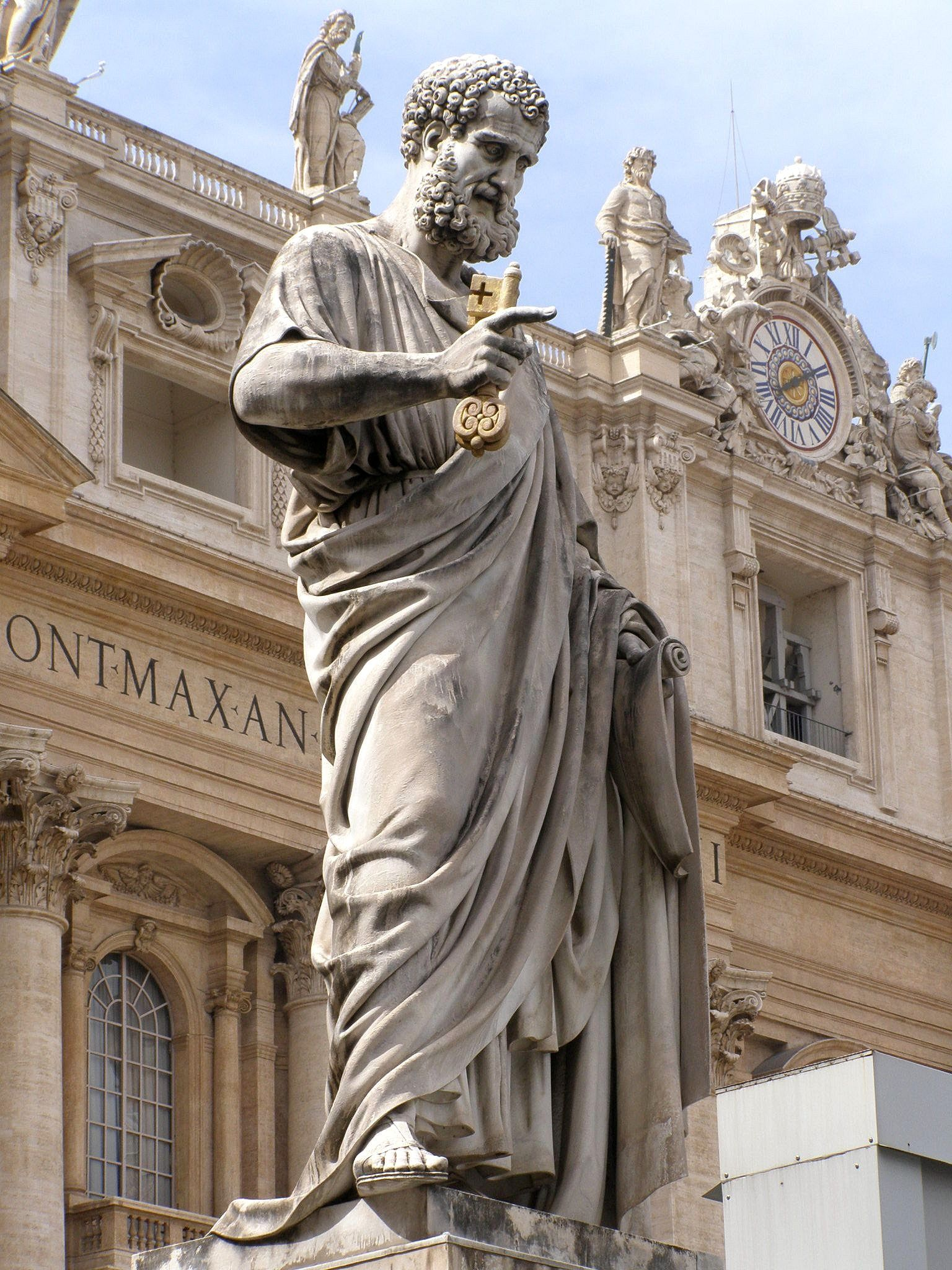 Socha sv. Petra je dielom Giuseppe de Fabrisa z roku 1840